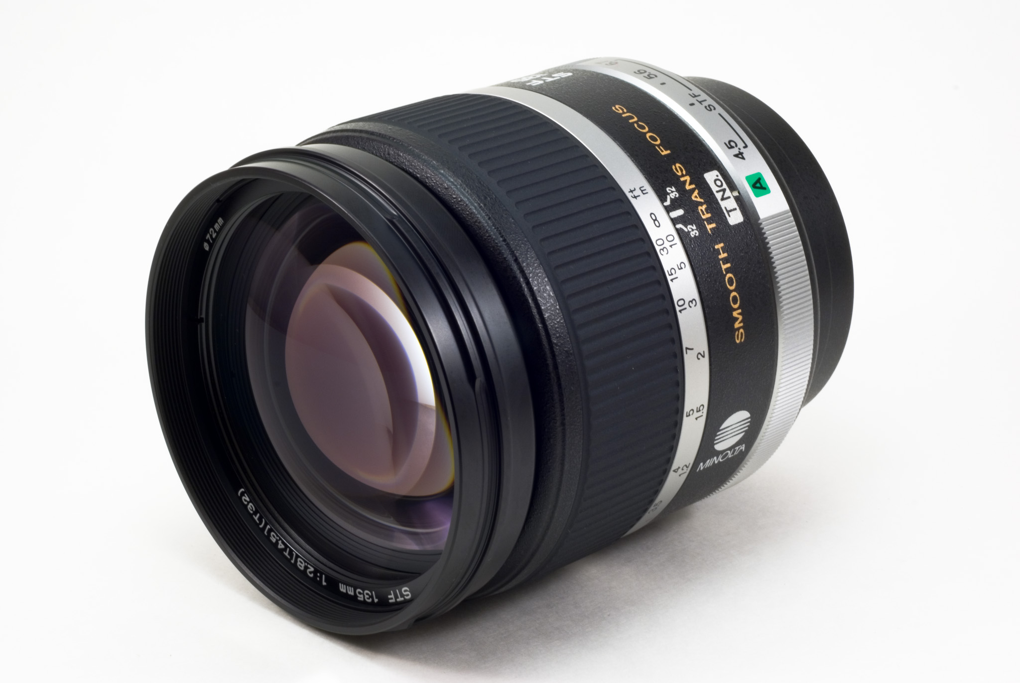 Minolta 135mm STF Lens